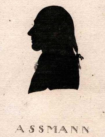 Scherenschnitt - Christian Gottfried Friedrich Assmann (1752-1822), deutscher Ökonomie- und Wirtschaftswissenschaftler